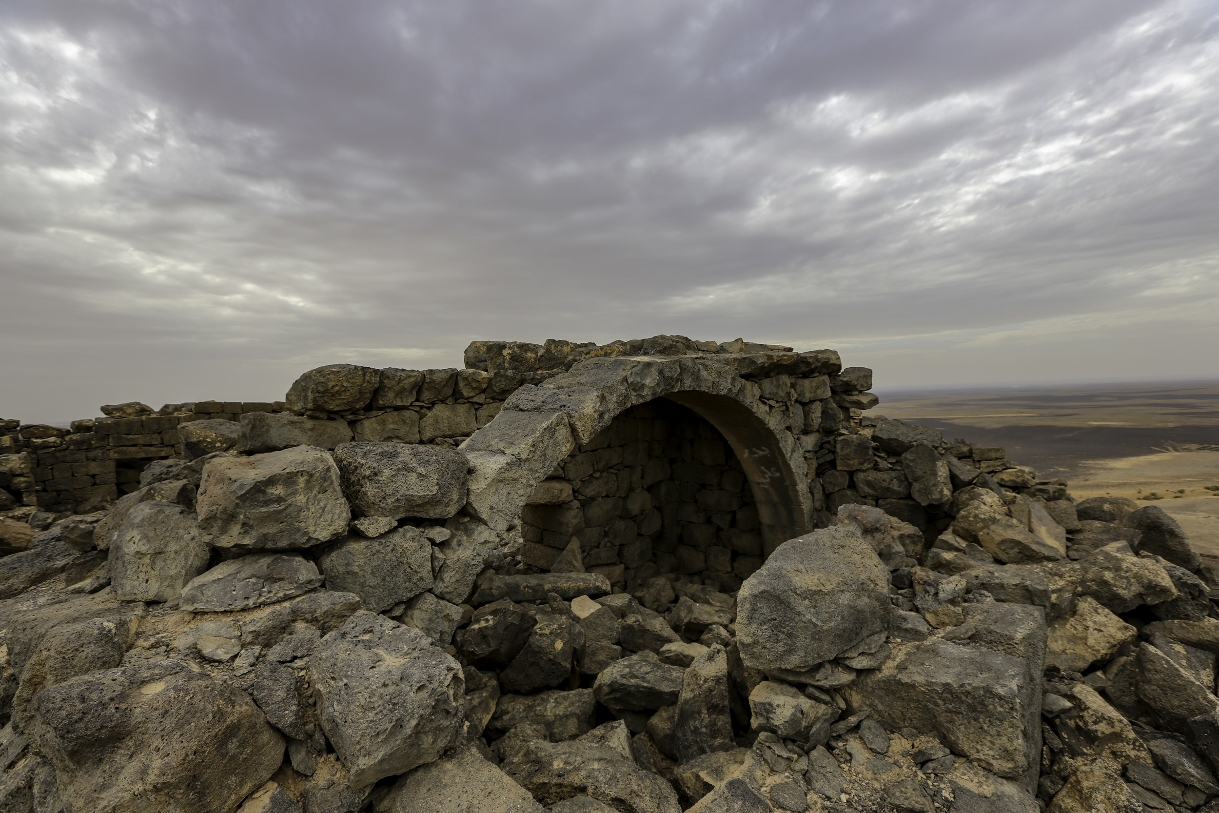 Qasr Aseikhim (Arch)